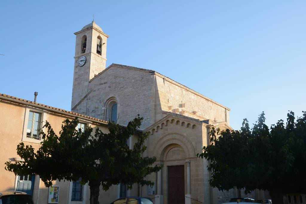 Eglise Sainte-Gervais